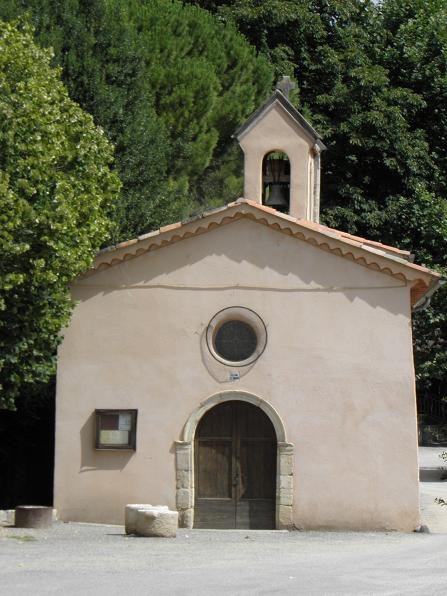 Église St-Roch de Montferrat (83)